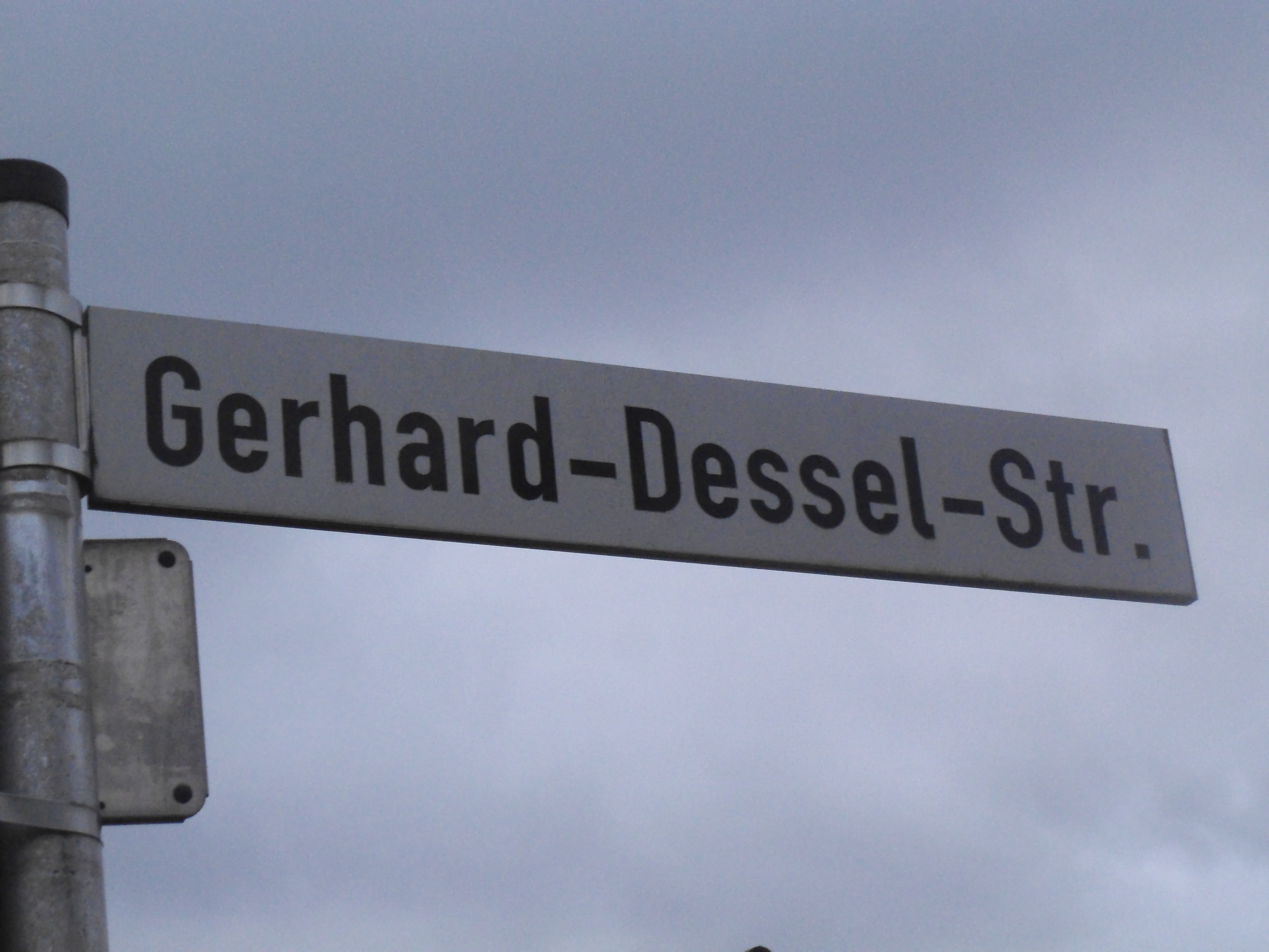 Straßenschild in einem Neubaugebiet am oberen Strückerberg in Ennepetal-Büttenberg. Die Straße ist nach einem ehemaligen Bürgermeister Ennepetals benannt.